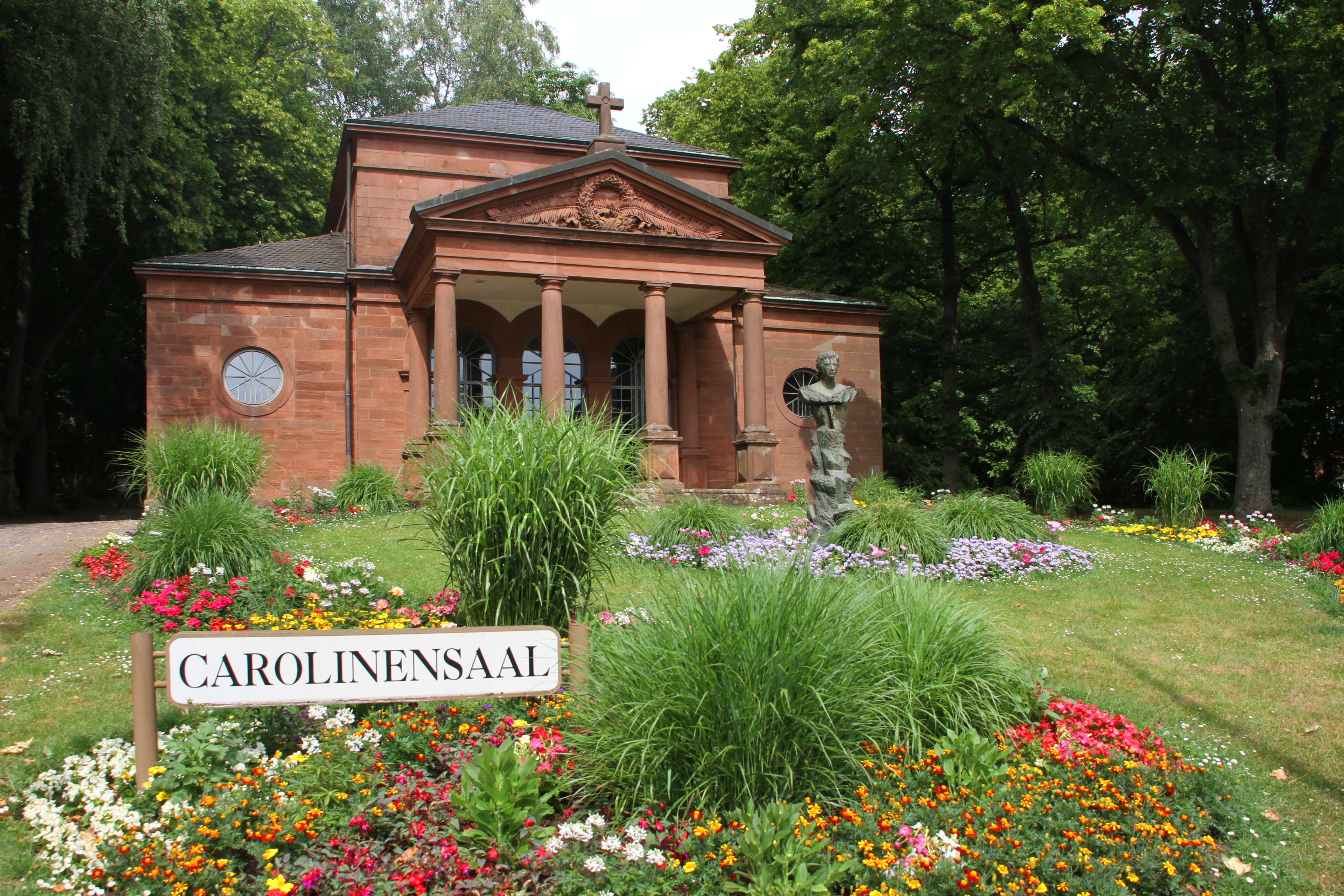 Carolinensaal beim Alten Friedhof in Pirmasens. Eingeschossige ehemalige Einsegnungshalle mit Portikus, wohl von 1880.